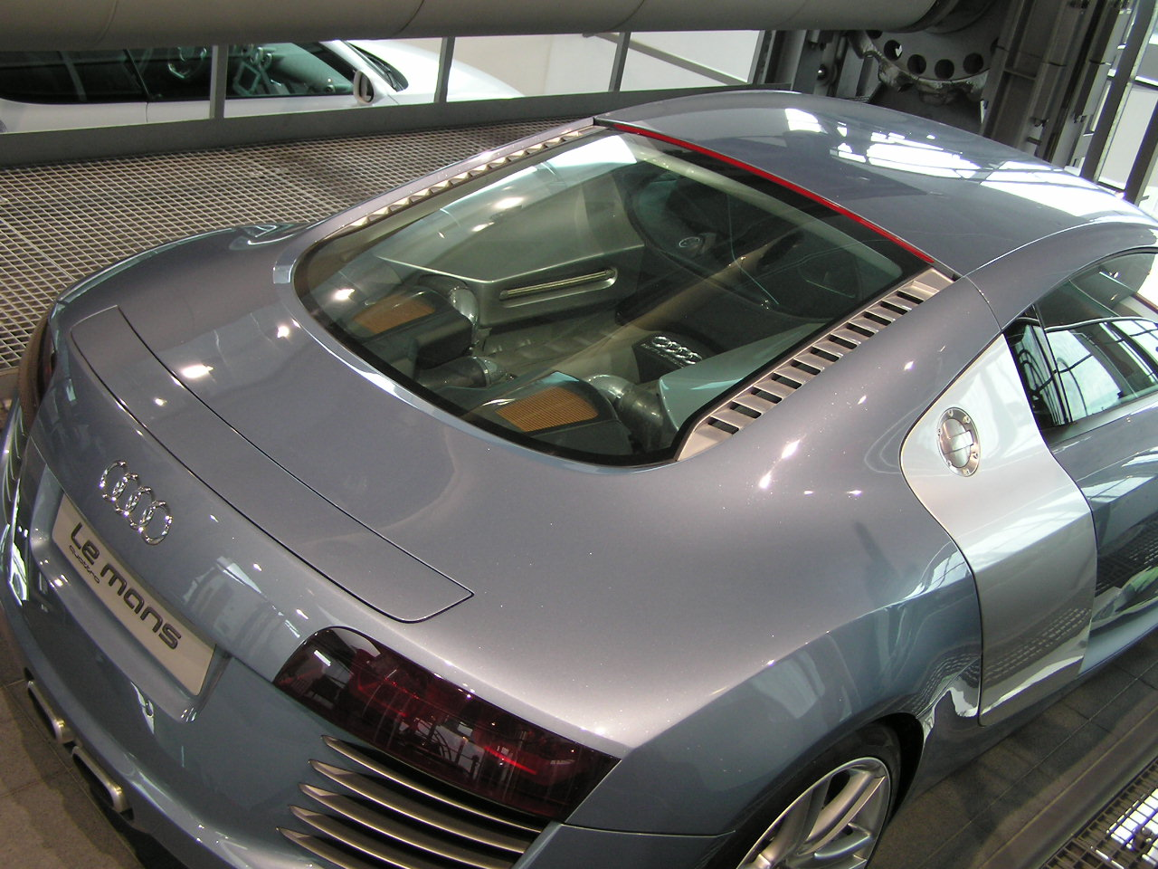 Audi Le Mans quattro, 2003